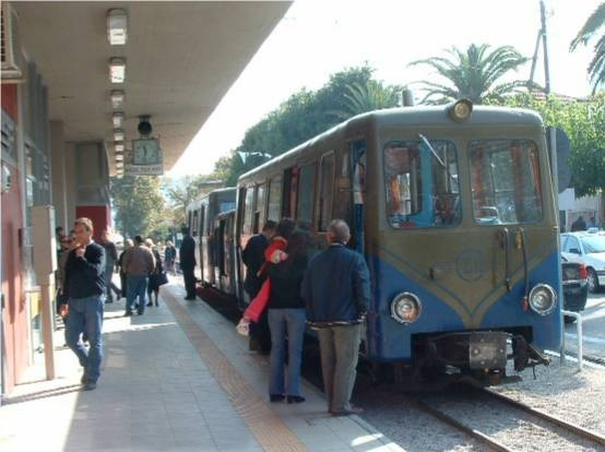 november 2005 Categorie:Afbeelding trein